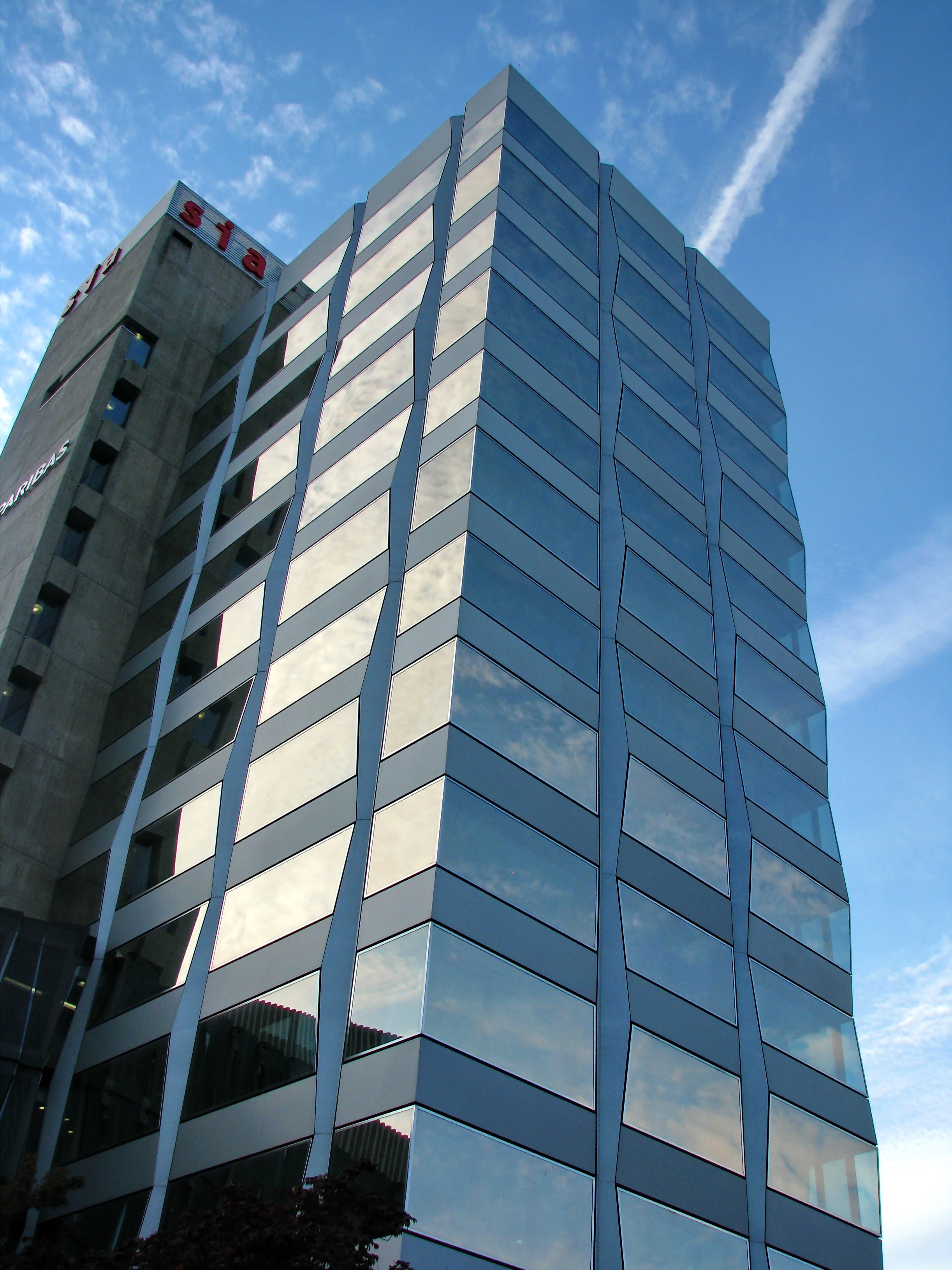 SIA building in Zürich